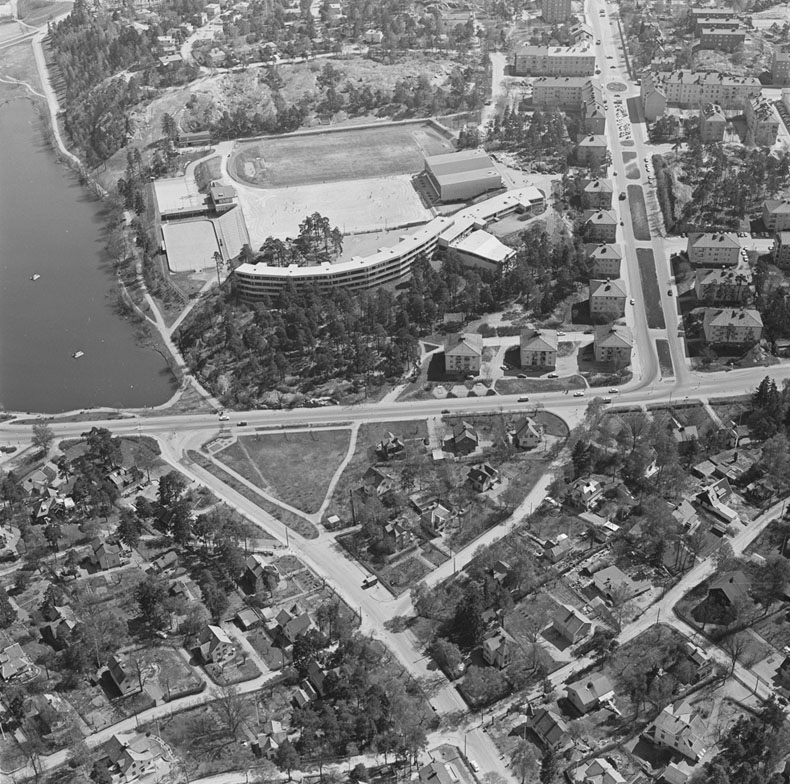 Lötskolan - Sundbyberg. Motiv: Lötskolan Nyckelord: Flygbilder Kategori: Bostadsområde, SkolaLötskolan - Sundbyberg.